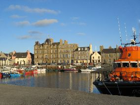 Hafen von Kirkwall auf Orkney Mainland